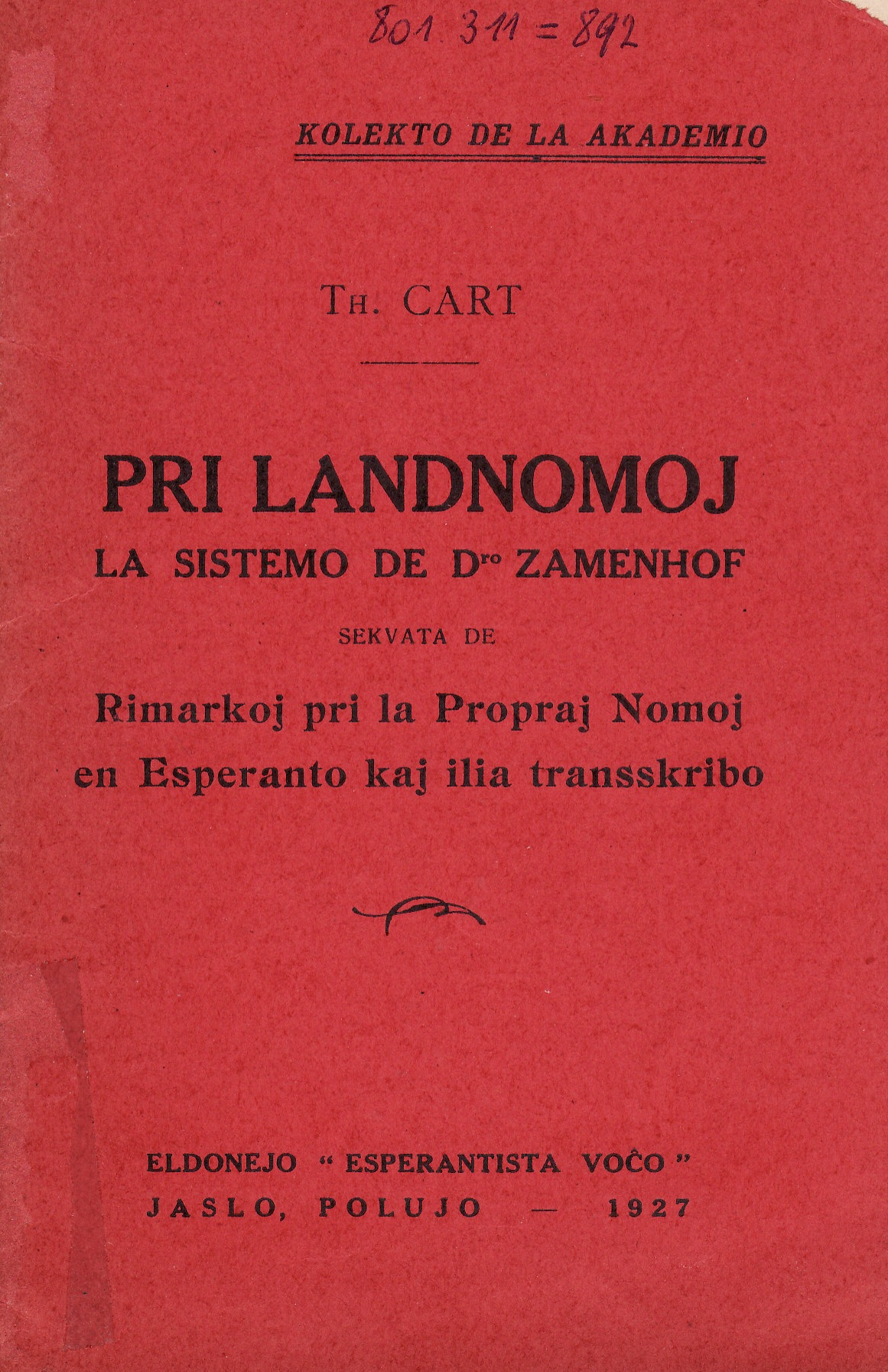 kovrilo de "Pri Landnomoj – La sistemo de Dro Zamenhof. Rimarkoj pri la Propraj Nomoj en Esperanto kaj ilia transskribo", 1927